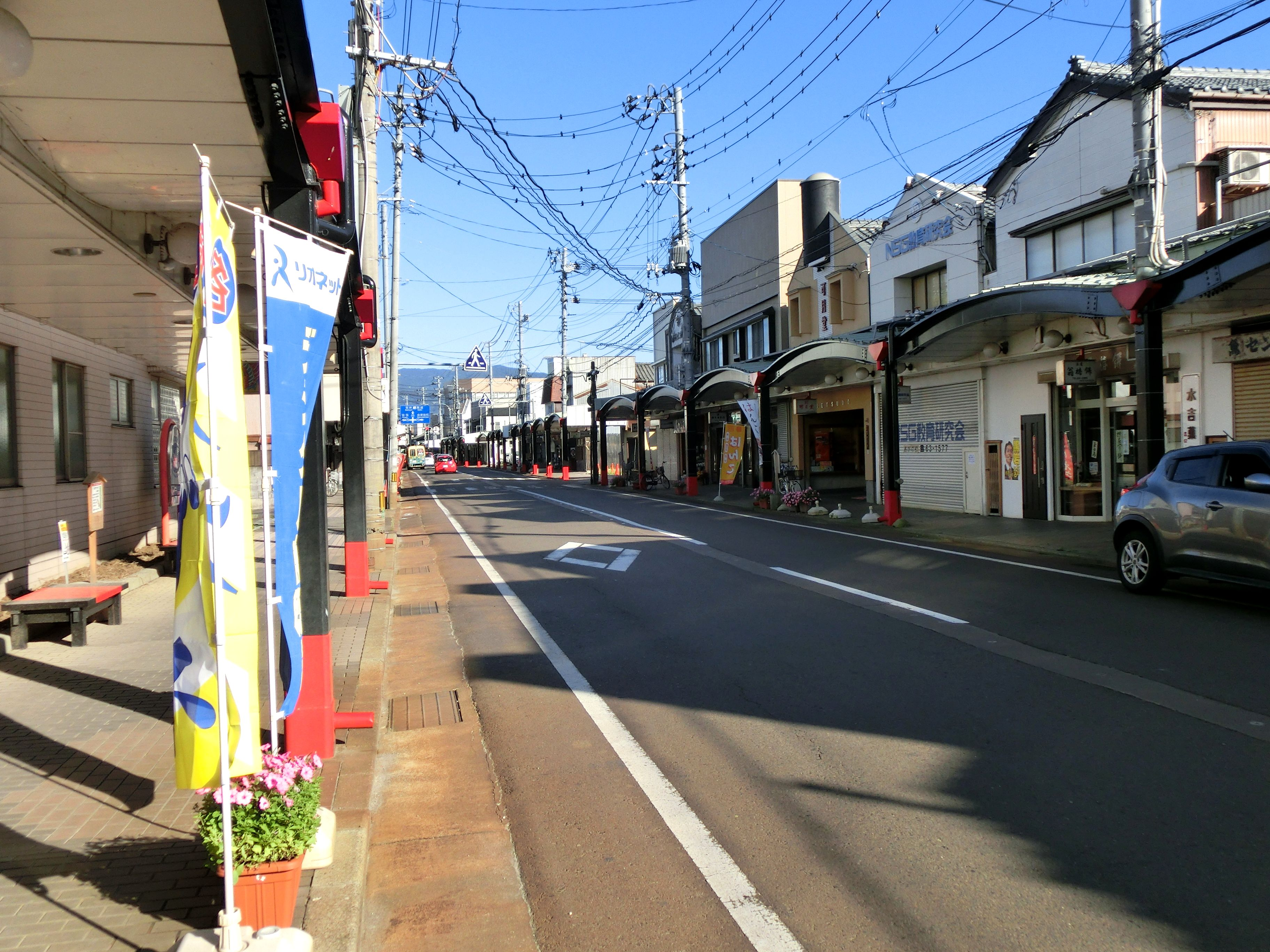 阿賀野市中心部（水原市街）